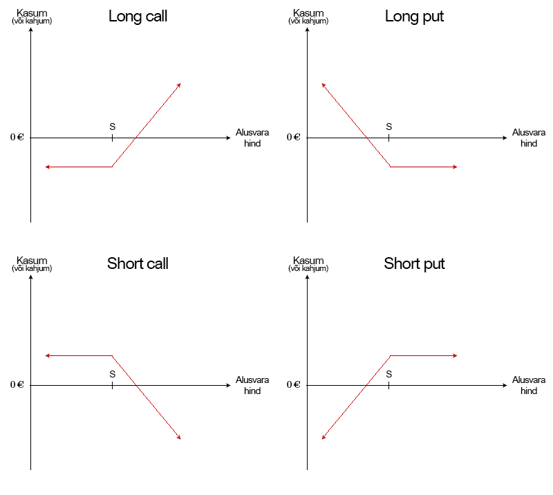 tavaliste optsioonistrateegiate kasumigraafikud